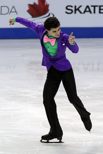 2010 Skate Canada International - Javier Fernández